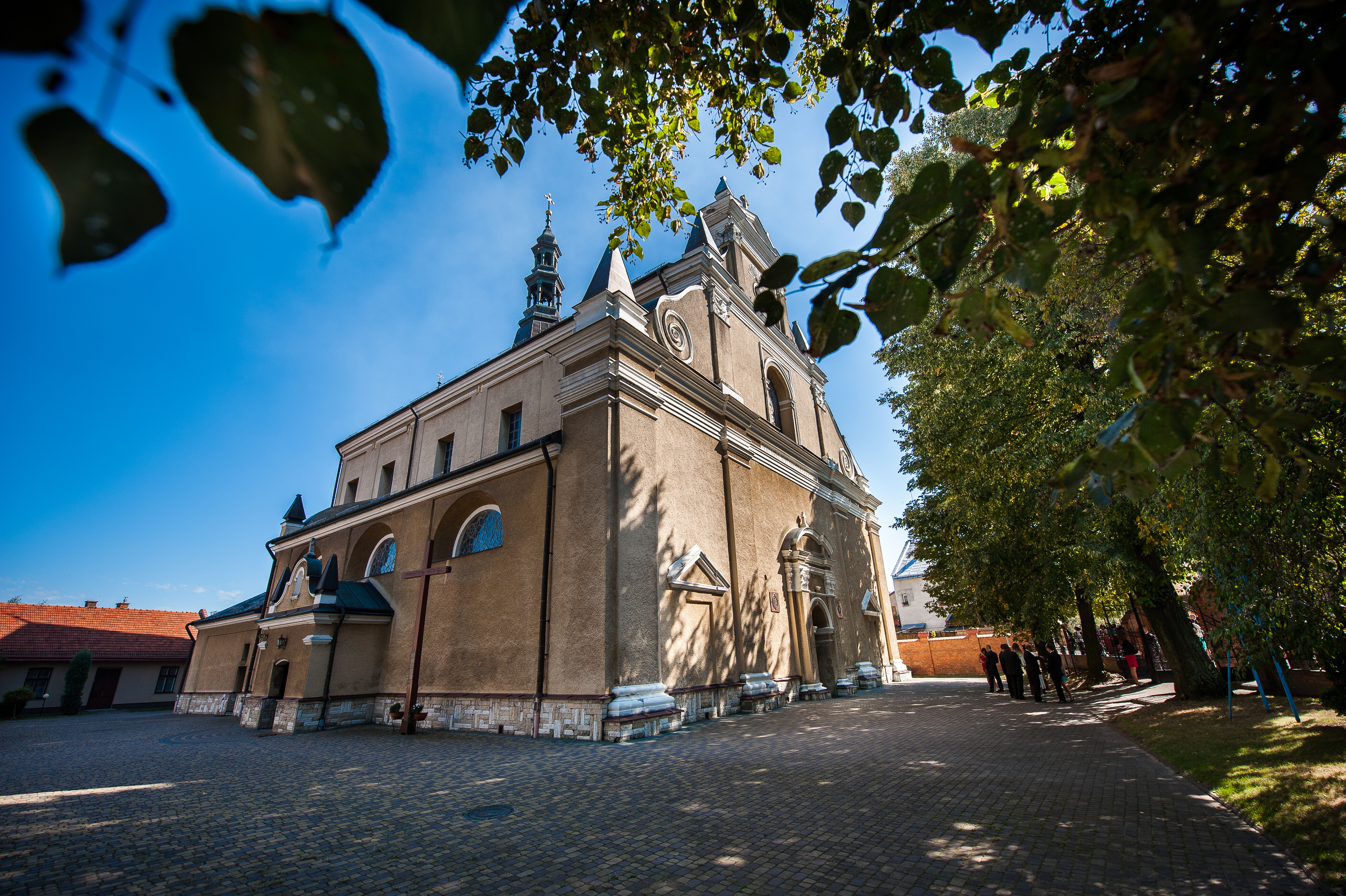 Radymno, kościół par. p.w. śś. Sebastiana i Wawrzyńca, 1729